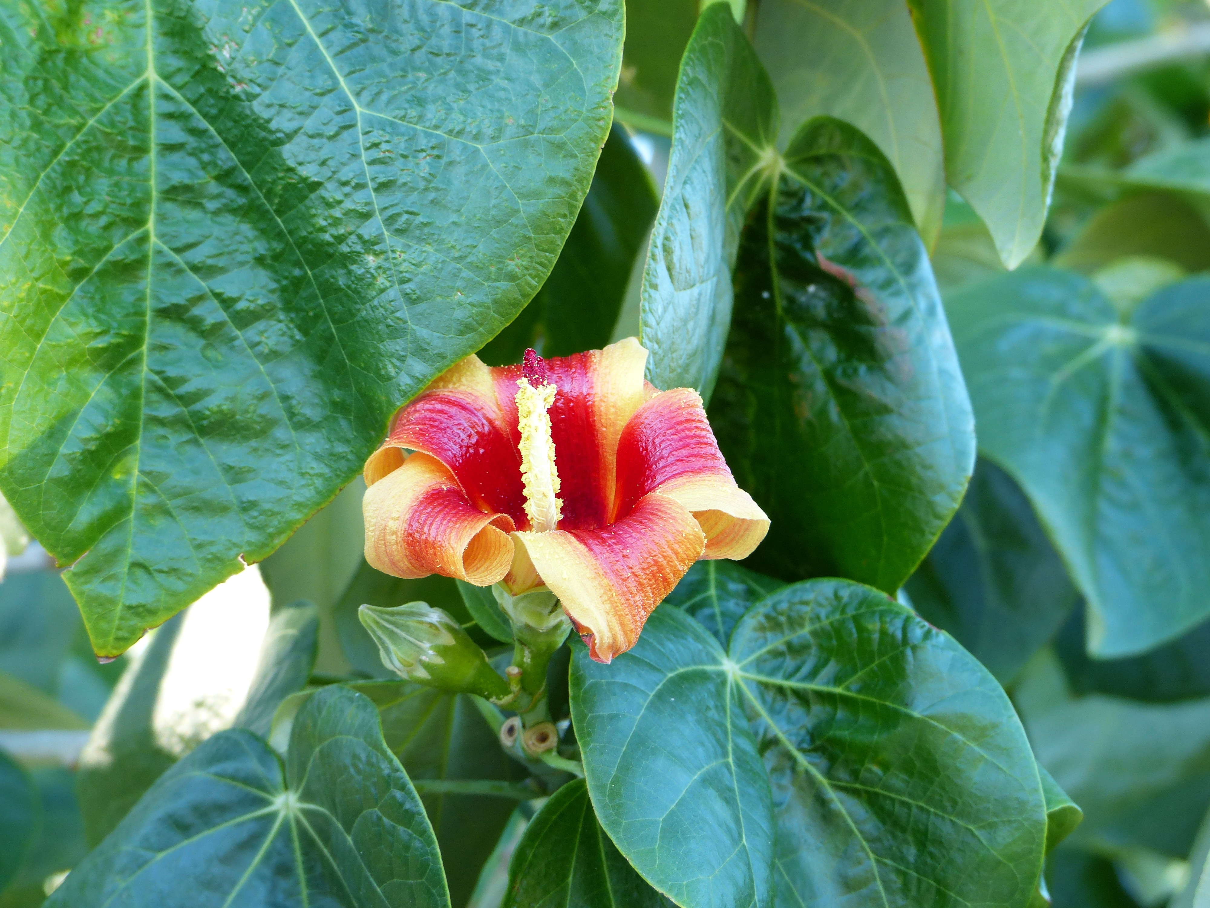 Hibiscus elatus Photo prise à Cuba